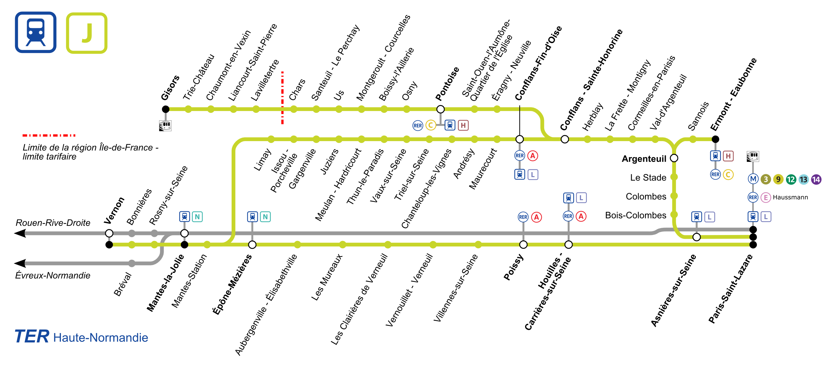 Plan schématique de la ligne J du Transilien avec indication des correspondances (RER, Transilien, métro, tram, autres trains).